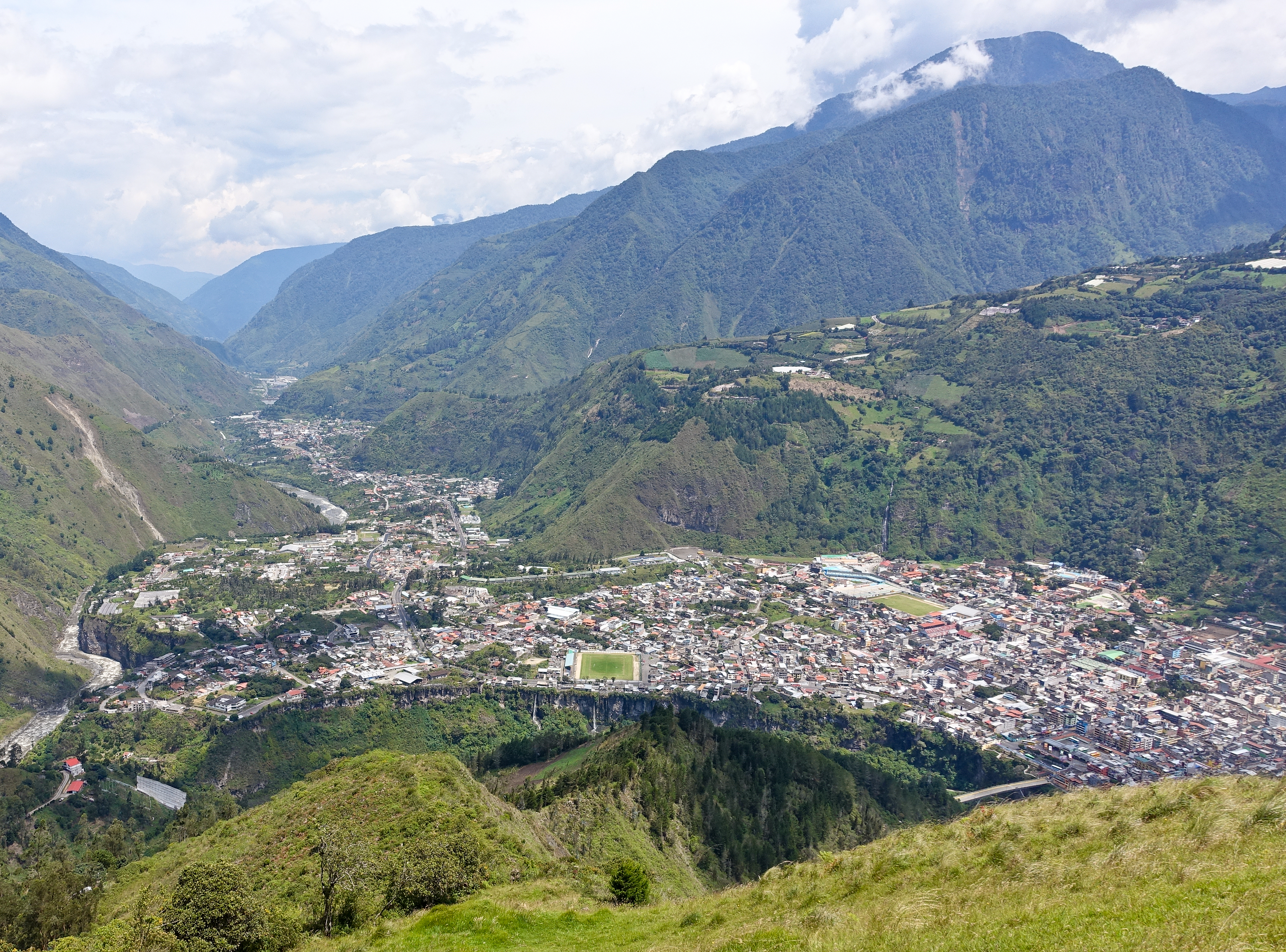 Baños de Agua Santa, Blick von Nordwesten (Anhöhe Lligua): Im Vordergrund die Schlucht des Río Pastaza, dahinter der Talkessel mit der Stadt vor den Nordost-Ausläufern des Vulkans Tungurahua